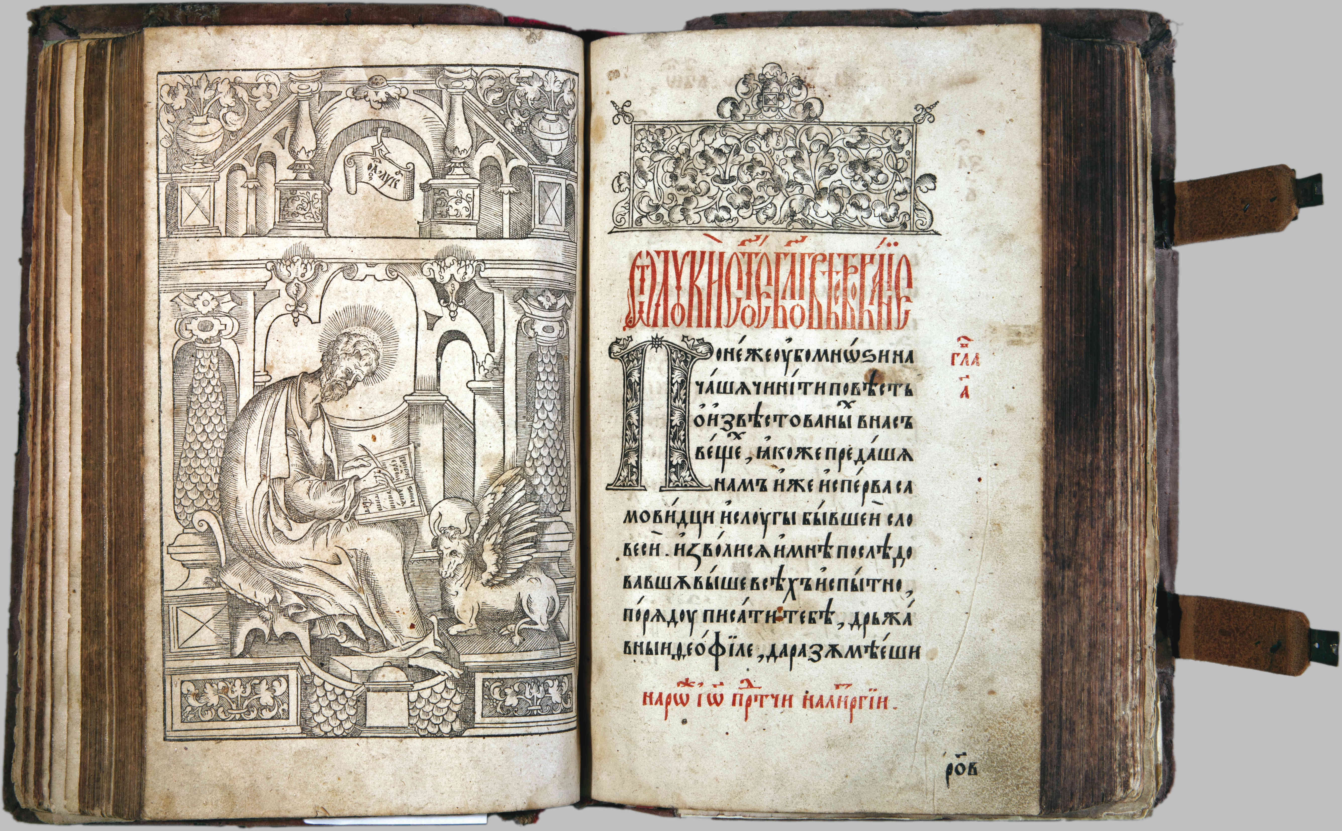 32,4×20,3×7,5 см